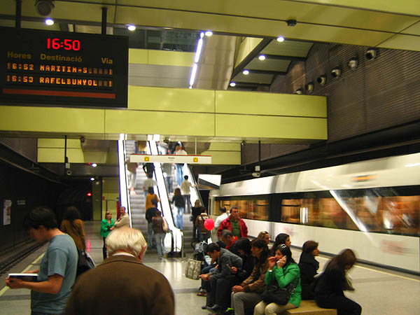 Estació de MetroValencia Colón.